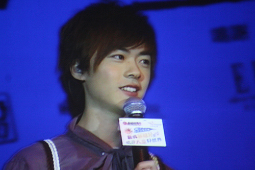 Ken Hung